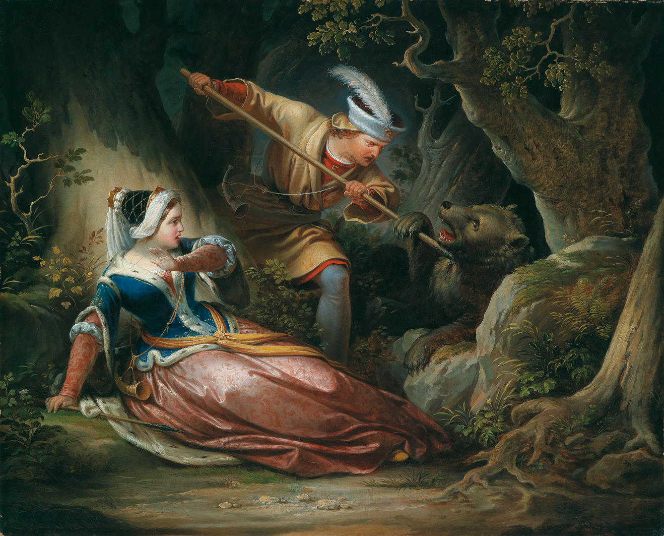 Herzog Ernst der Eiserne rettet Cimburgis von Masowien